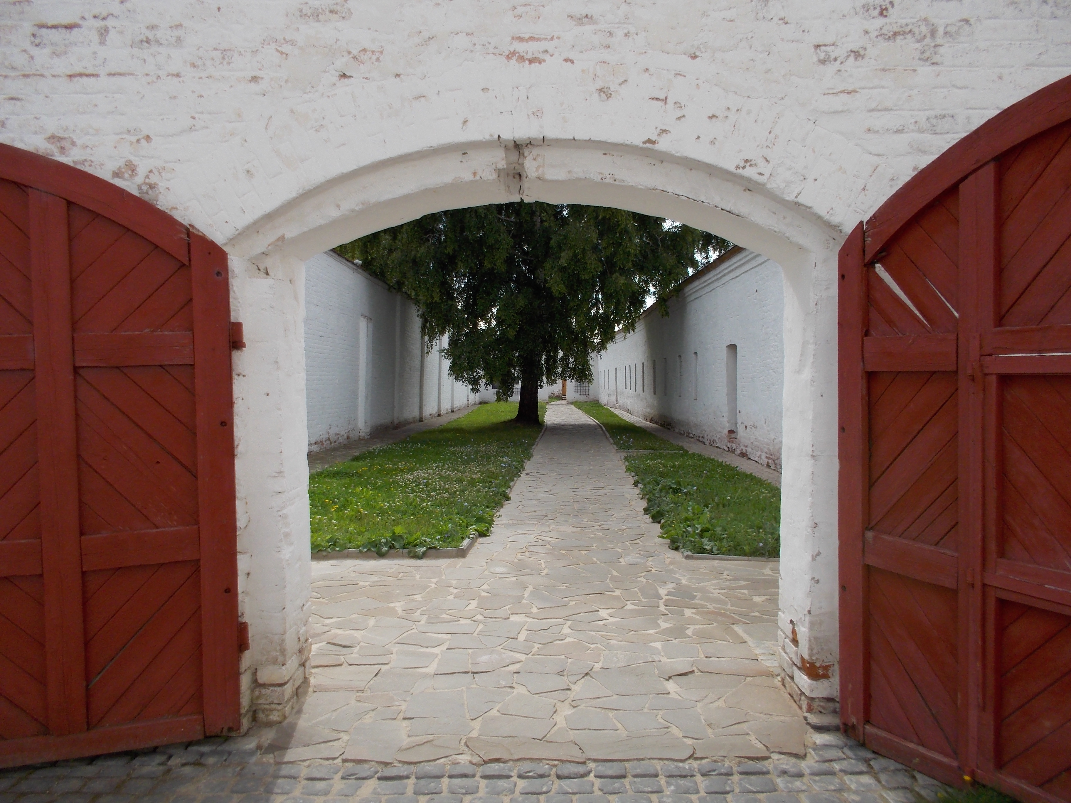 Тюремный комплекс Спасо-Евфимиева монастыря (Владимирская область, Суздаль, Кремлевская улица, 10)